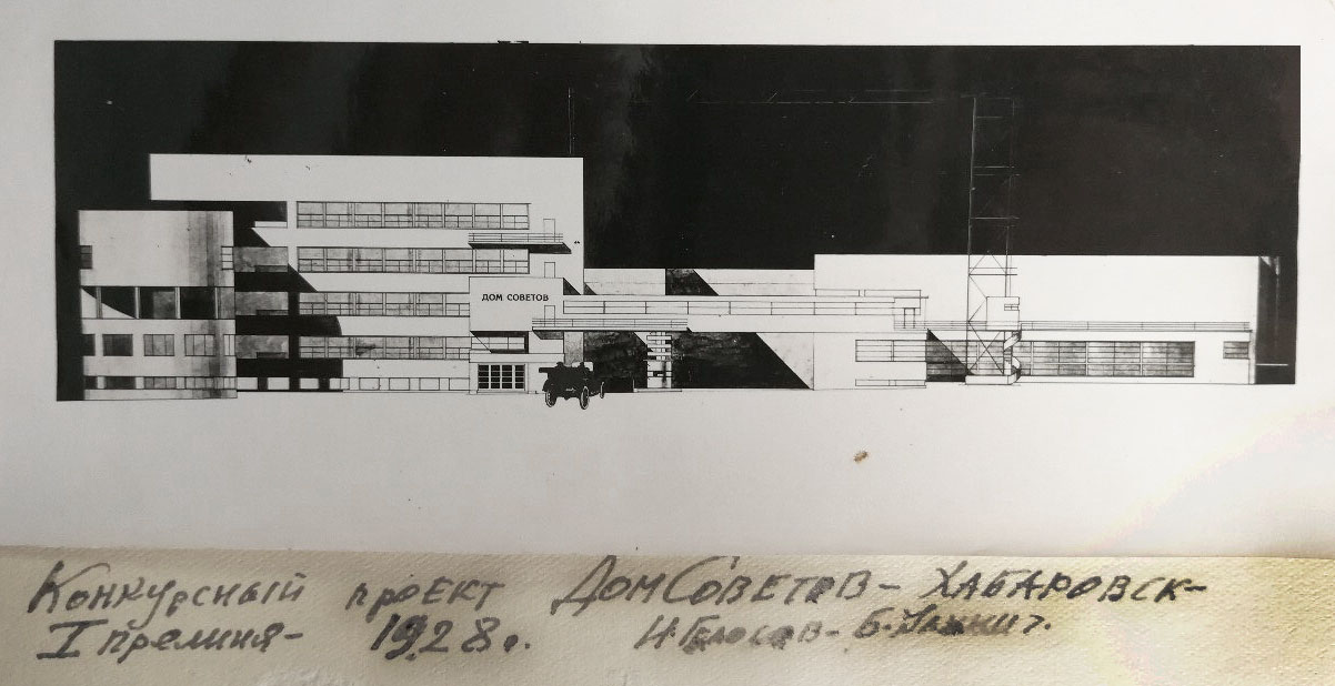 Конкурсный проект Дома Советов в Хабаровске. Фасад. Архитекторы: Голосов И.Голосов и Б.Улинич. 1928 г.